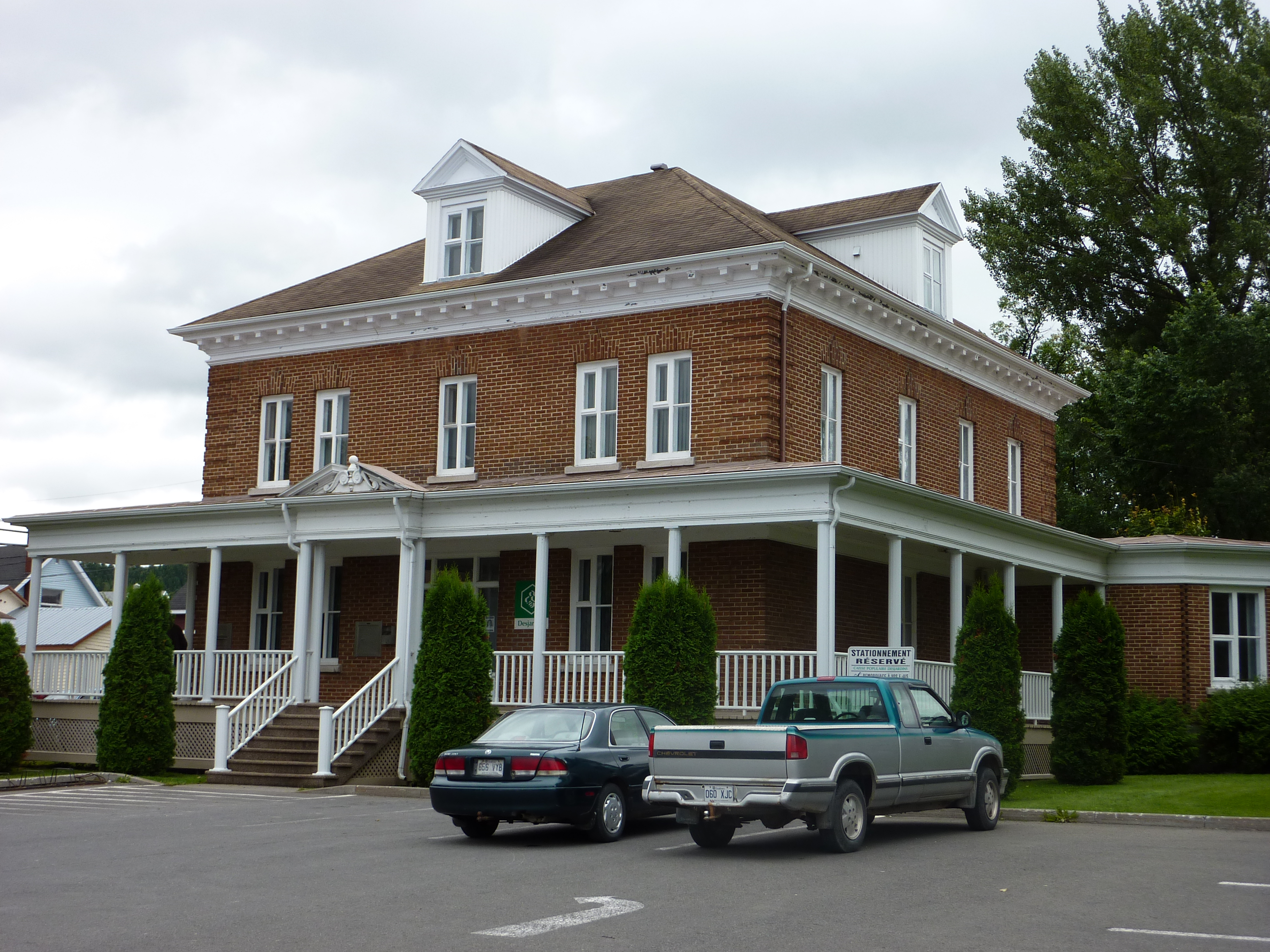 Presbytère de Val-Brillant converti en caisse populaire